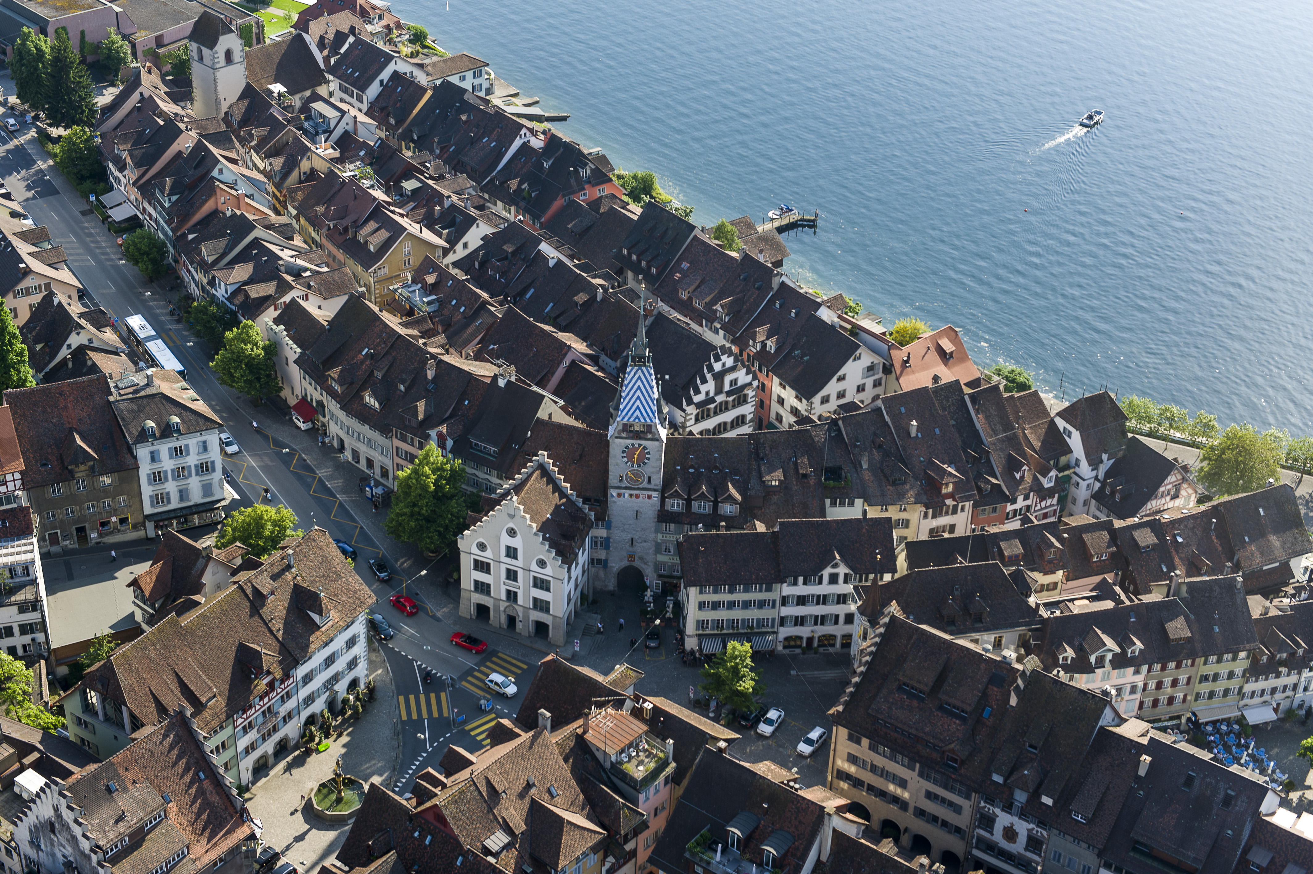 The Birdeye view of Zug`s Old Town